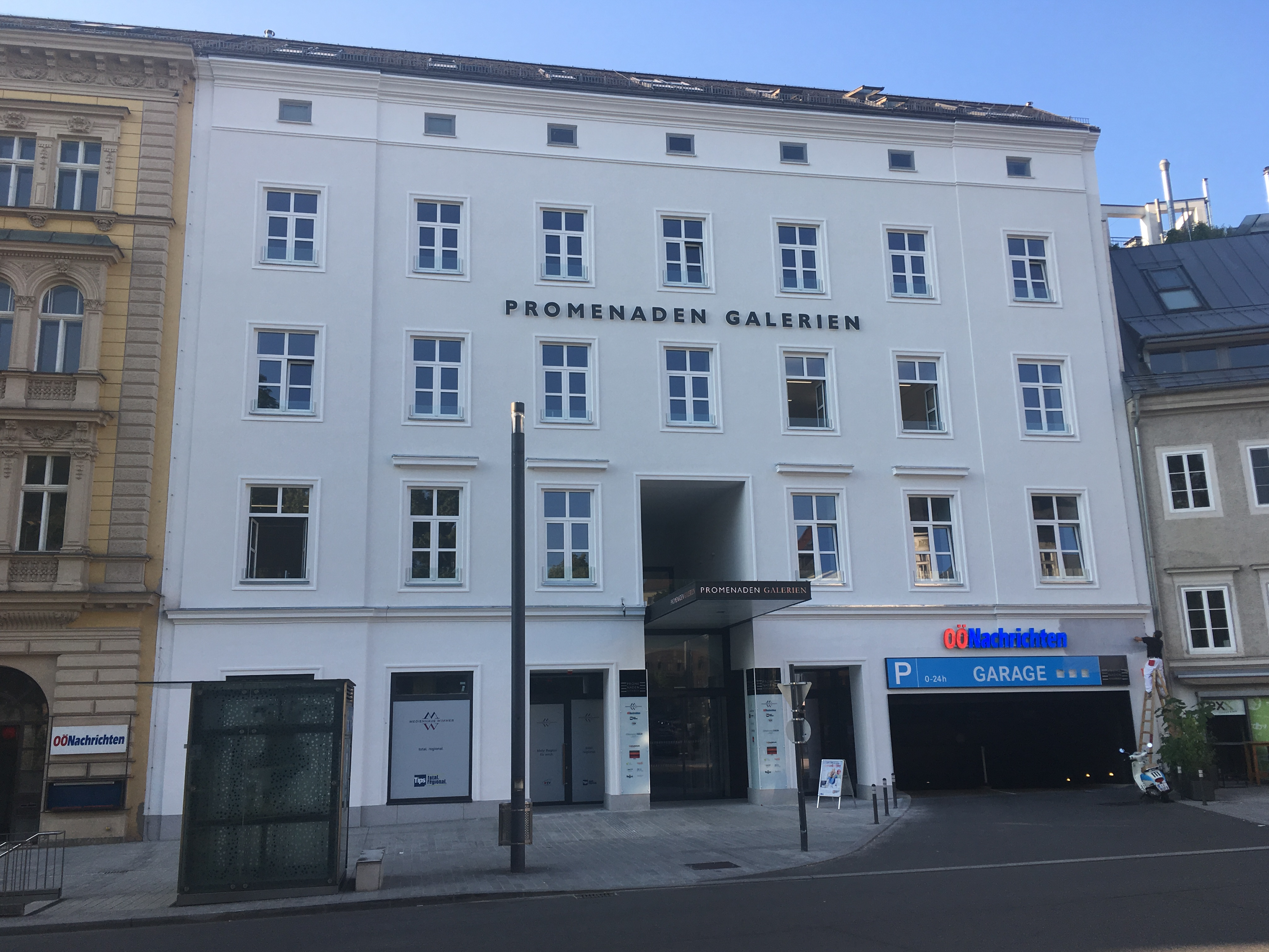 Linz Promenade 25 - Eingang zu den 2017 eröffneten "Promenaden Galerien"